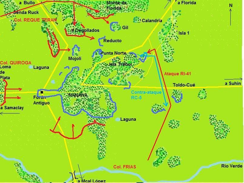 Guerra del Chaco. Primera batalla de Nanawa